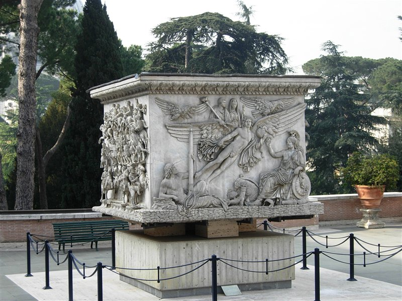 Vatican Museum